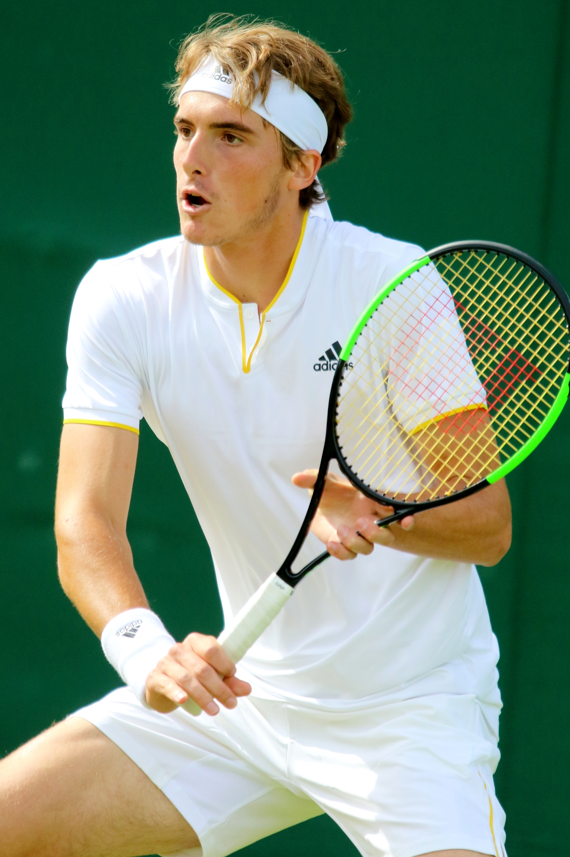 Tsitsipas WM17 (16)